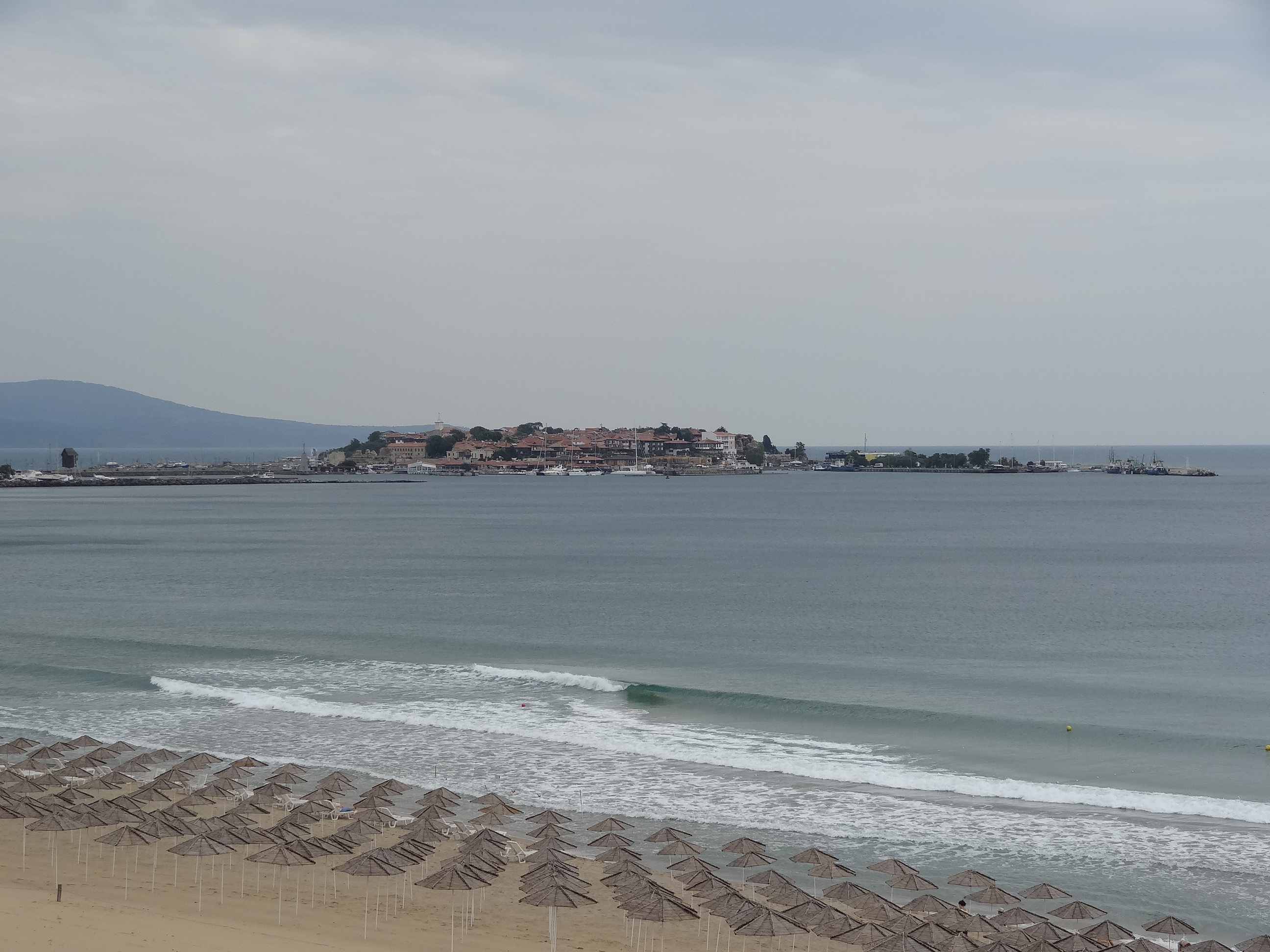 Views of Nesebar